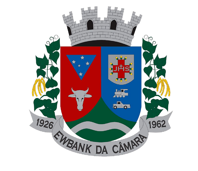 Brasão do Município de Ewbank da Câmara